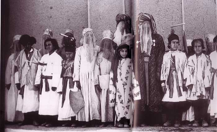 Darsteller einer Taziye-Aufführung